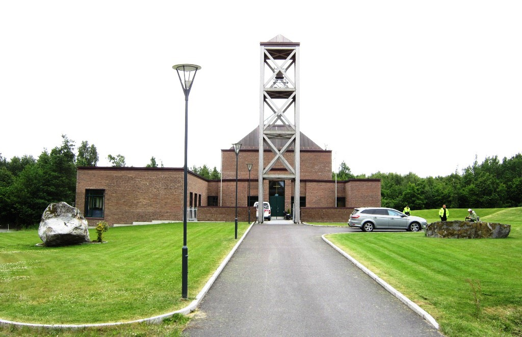 Berg arbeidskirke, Brunlanes